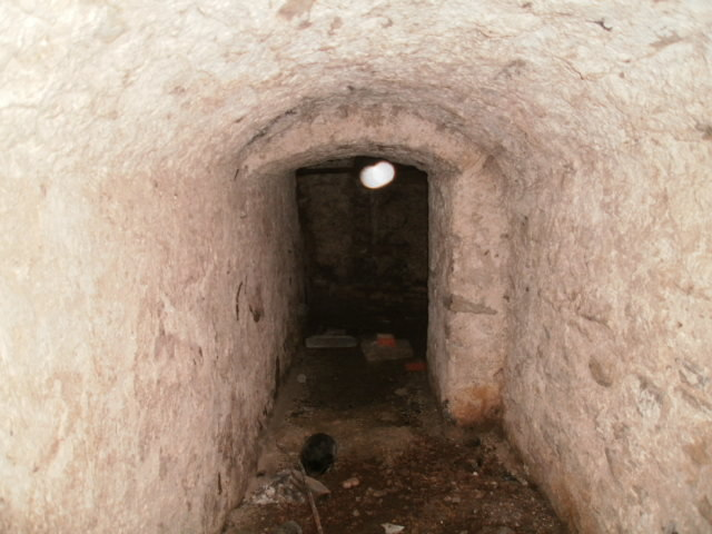 Vaade kinnimüüritud käigust väljapääsu poole.